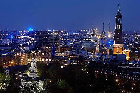 panoramabild von Hamburg bei Nacht mit St. Michaeliskirche